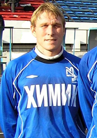 А_Рычков